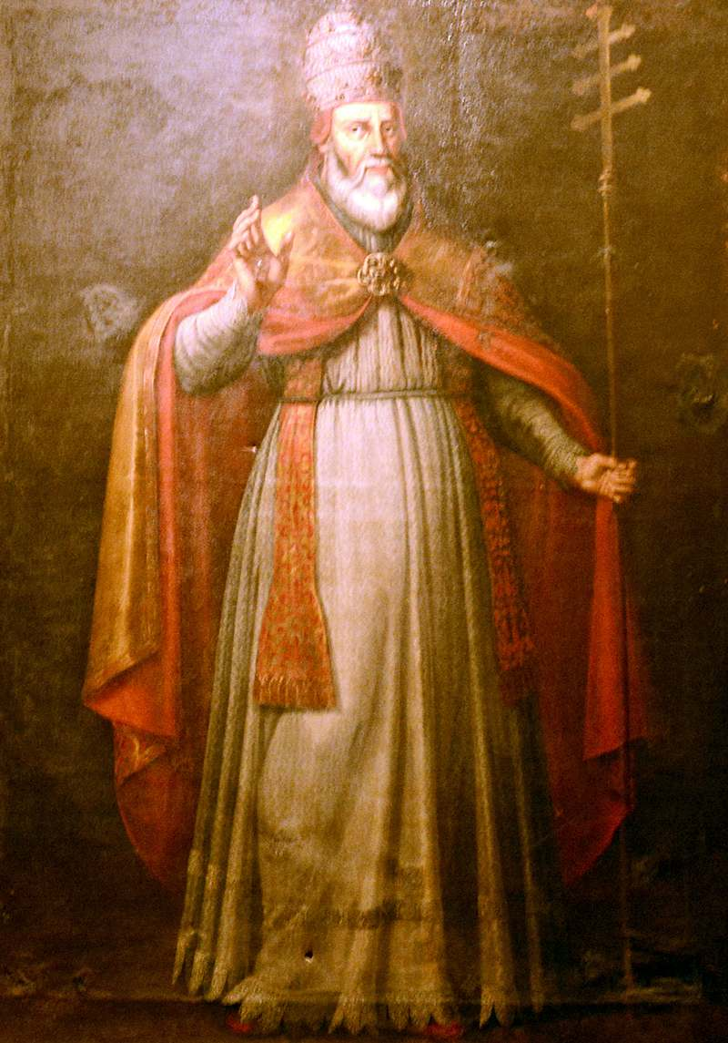 Papst Paul IV. - Ölgemälde in der Kirche Santi Michele e Gaetano in Florenz